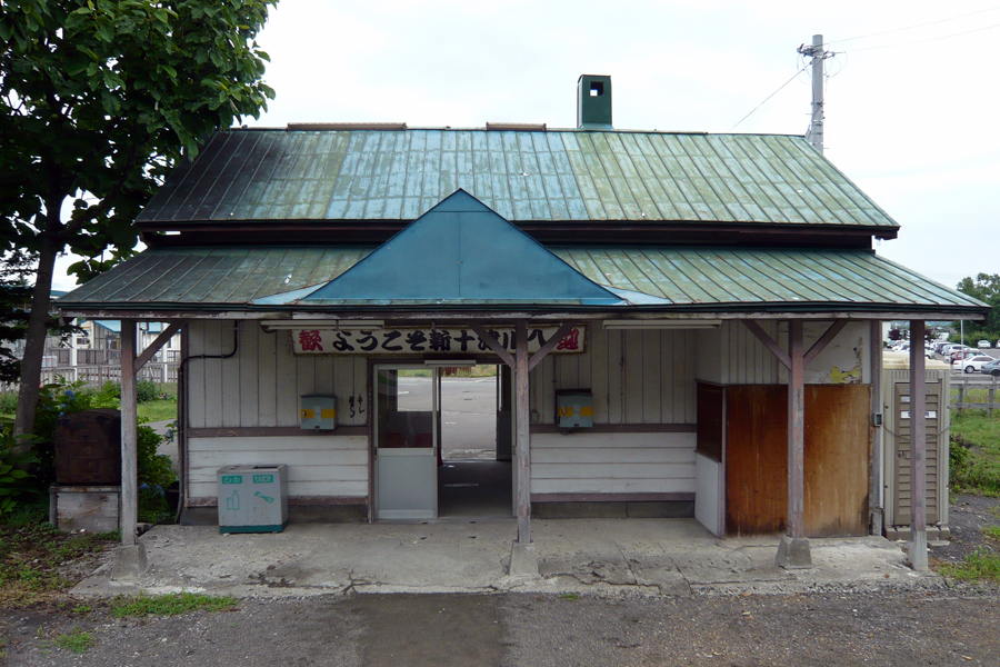 ホームから見た新十津川駅舎 撮影日 2007年8月4日 撮影場所 新十津川駅ホームより 撮影者 投稿者と同じ（Photonica） 撮影者によるGFDLリリース